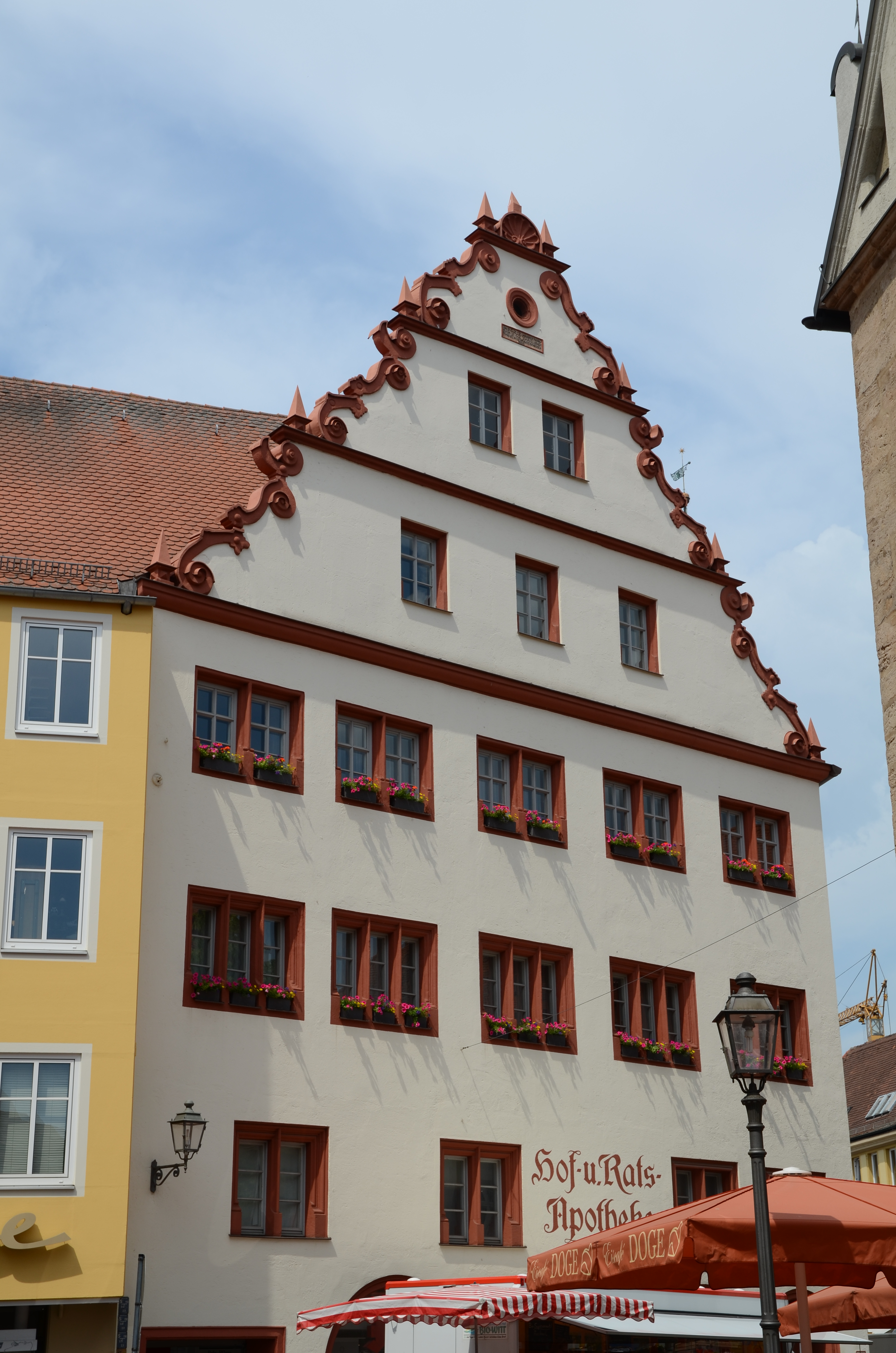 Ansbacher Rathaus